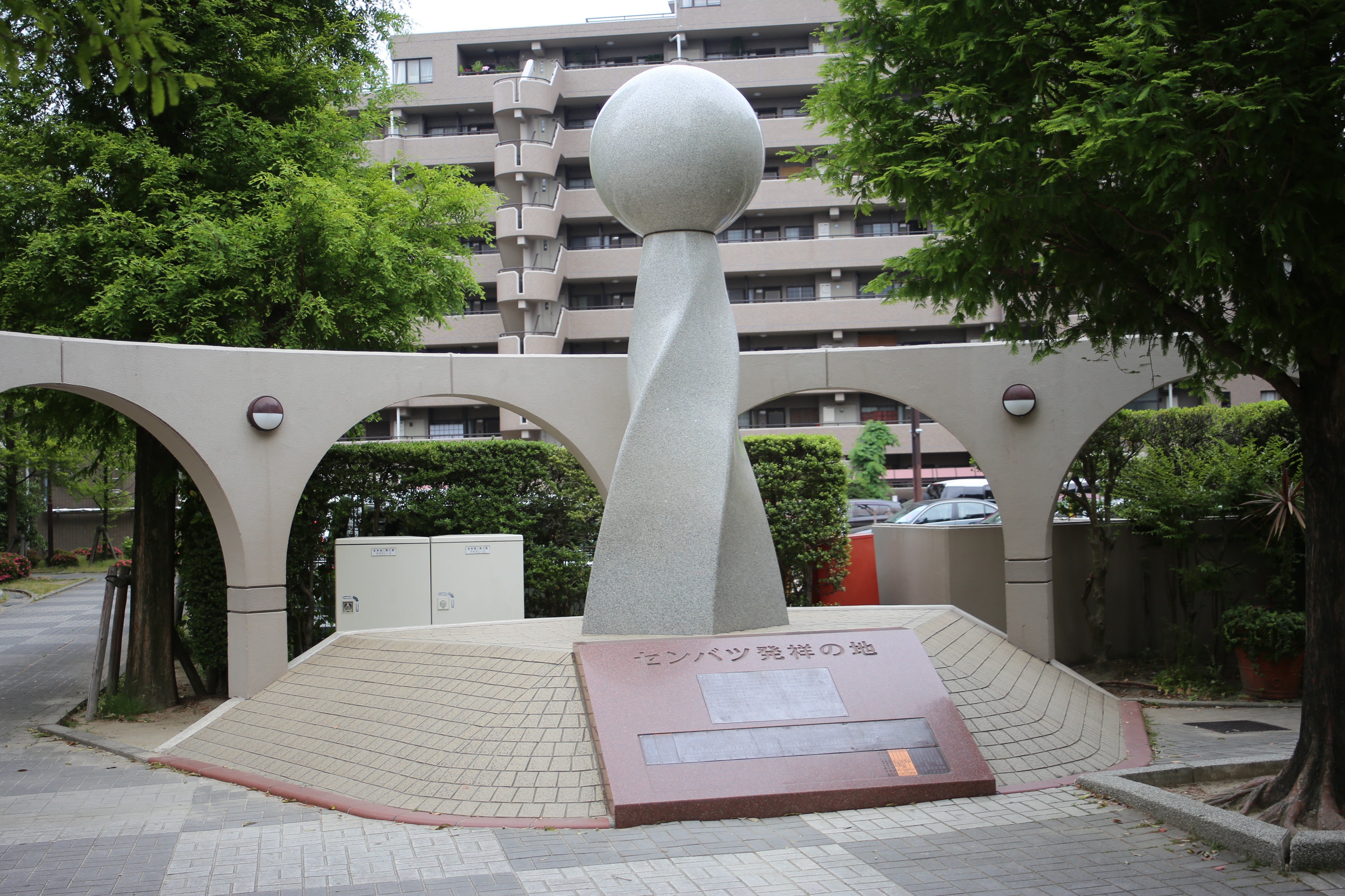 名古屋市昭和区滝川町の「センバツ発祥の地」碑